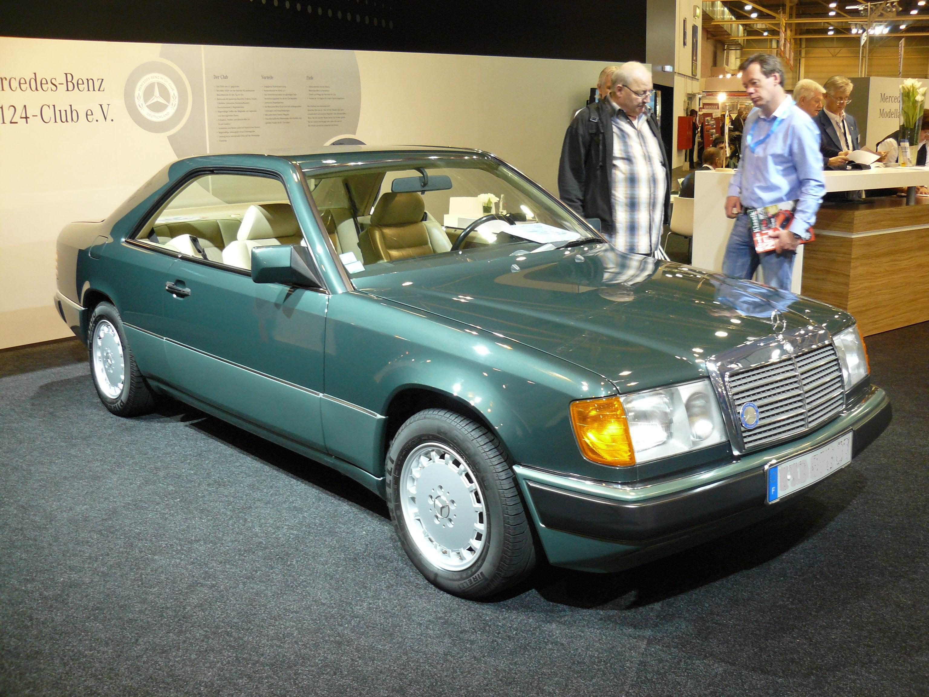 Essen 2011